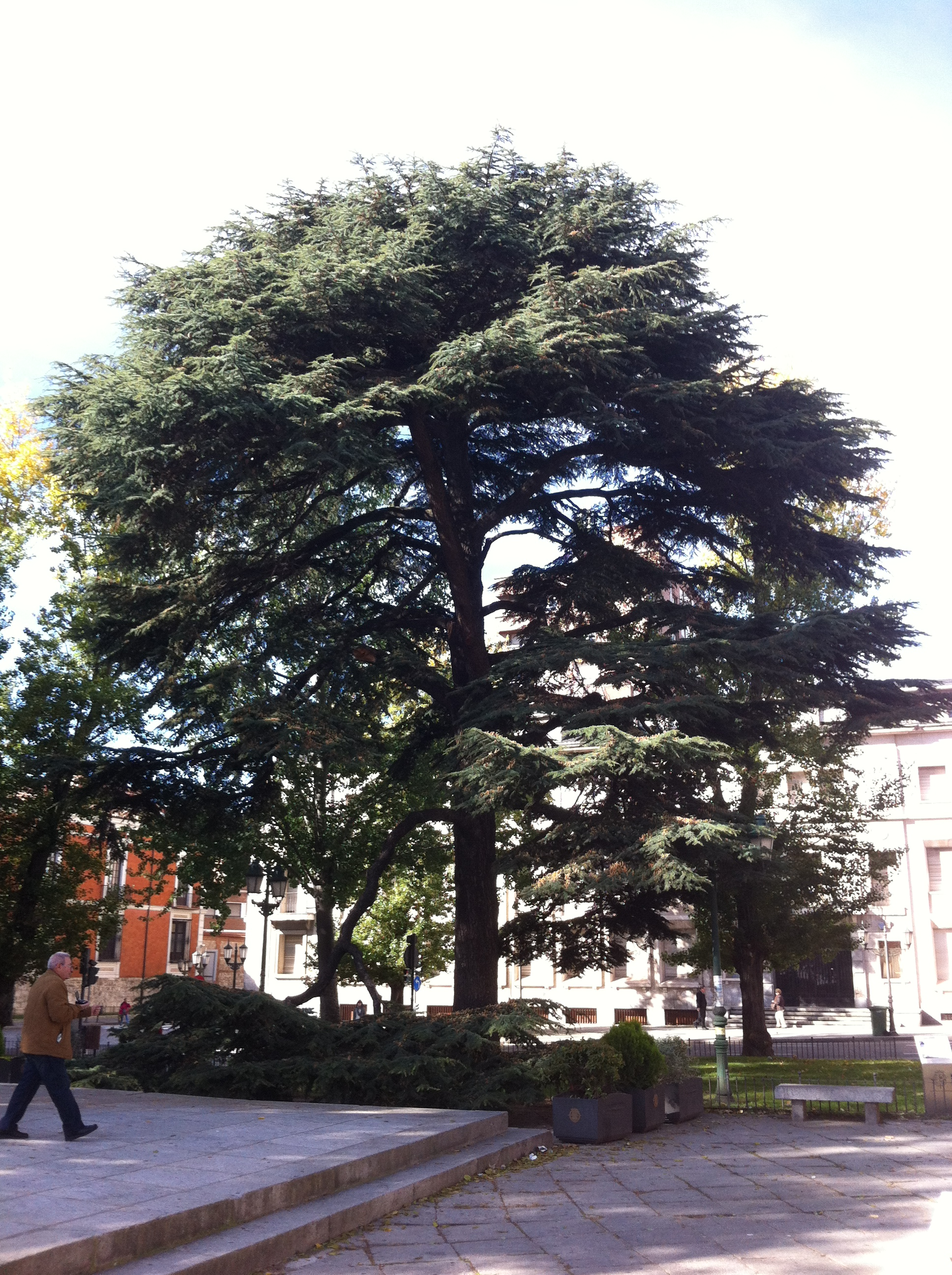 Cedro situado en la plaza de San Pablo en la ciudad de Valladolid. Por su amplio porte, se considera plantado hacia el año 1880, junto con otros del Campo Grande.